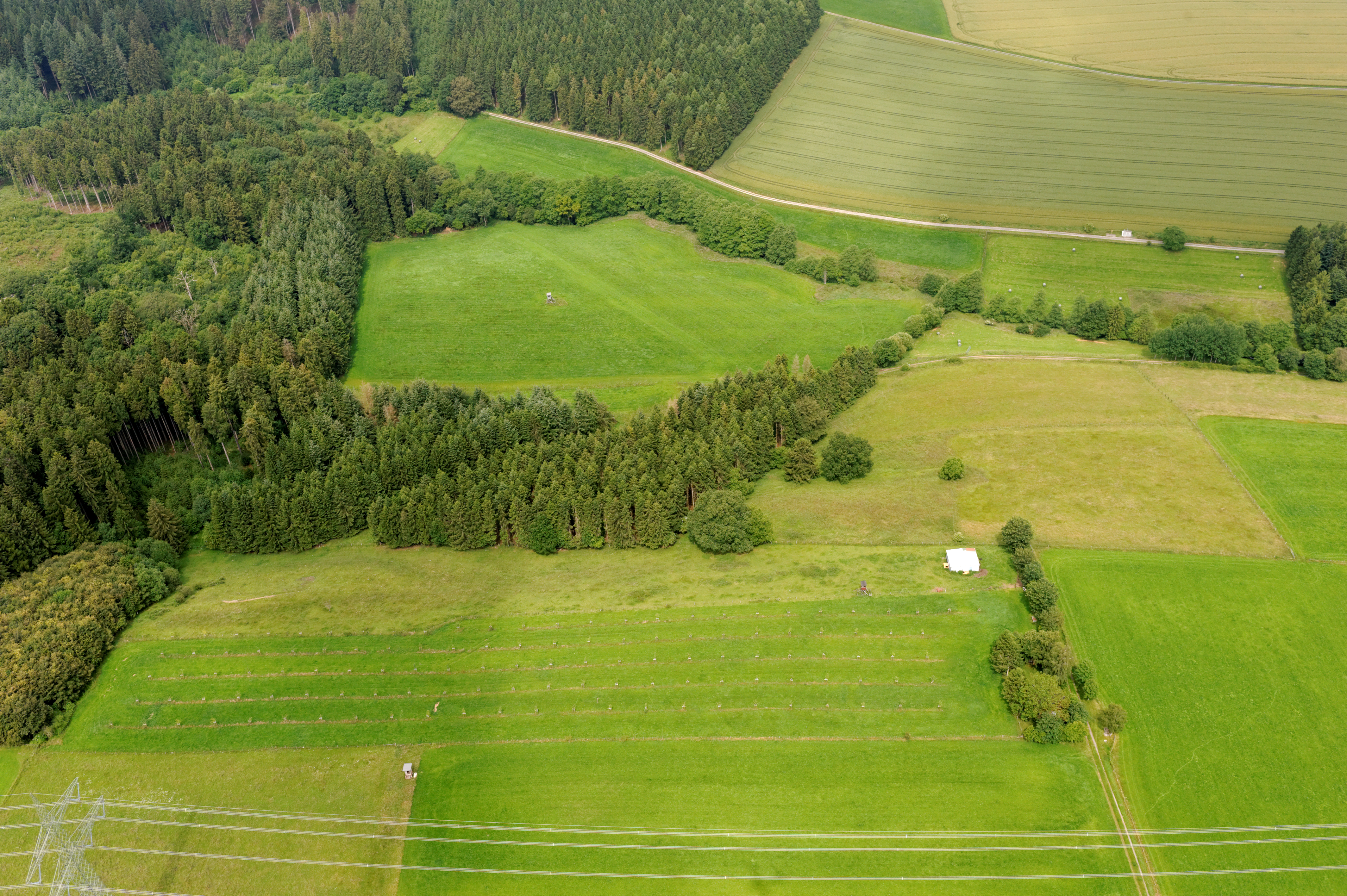 Fotoflug Sauerland Nord. Teil des Naturschutzgebietes Goldbachtal. The making of this document was supported by the Community-Budget of Wikimedia Germany.